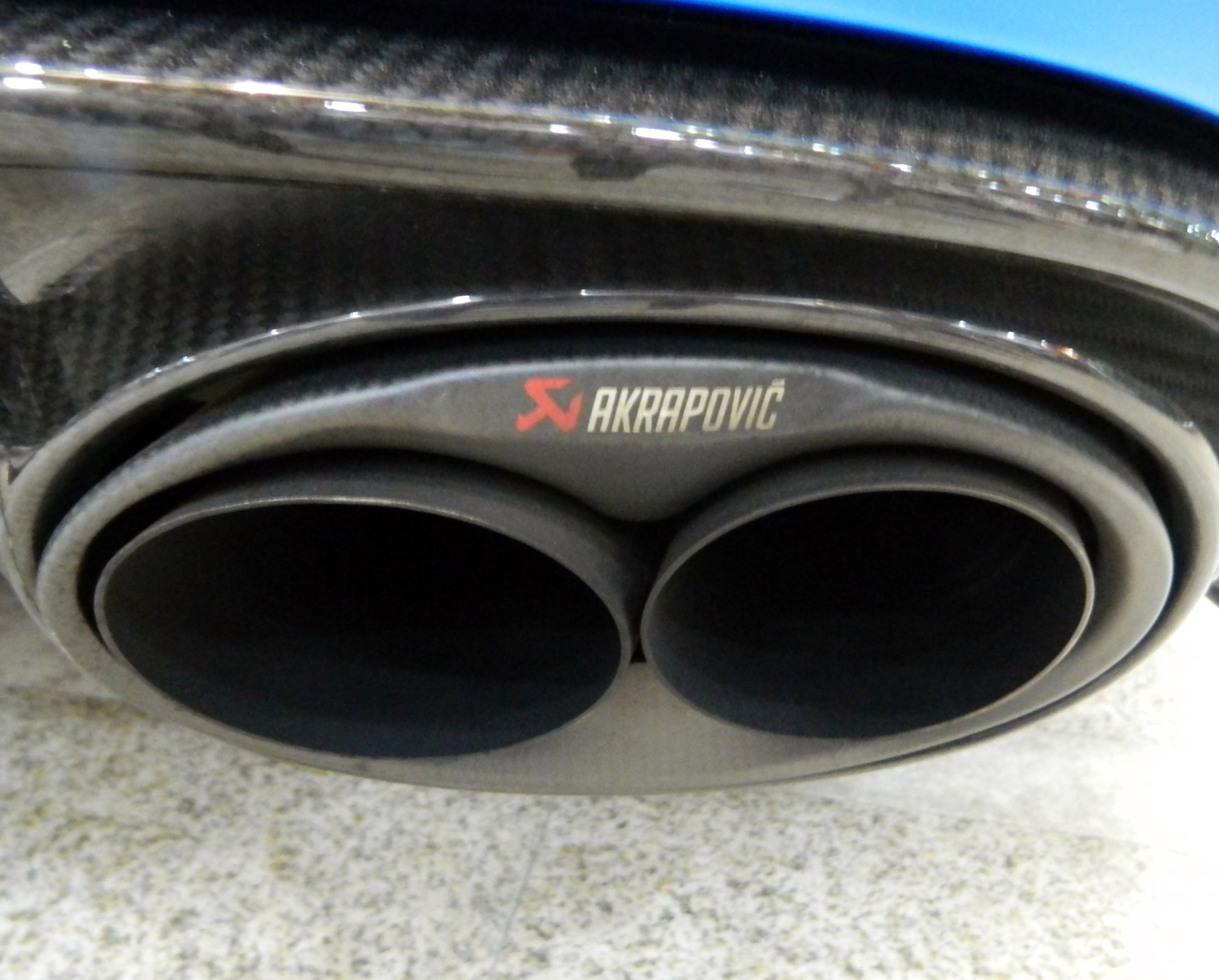 Akrapovic exhaust system in Audi RS7